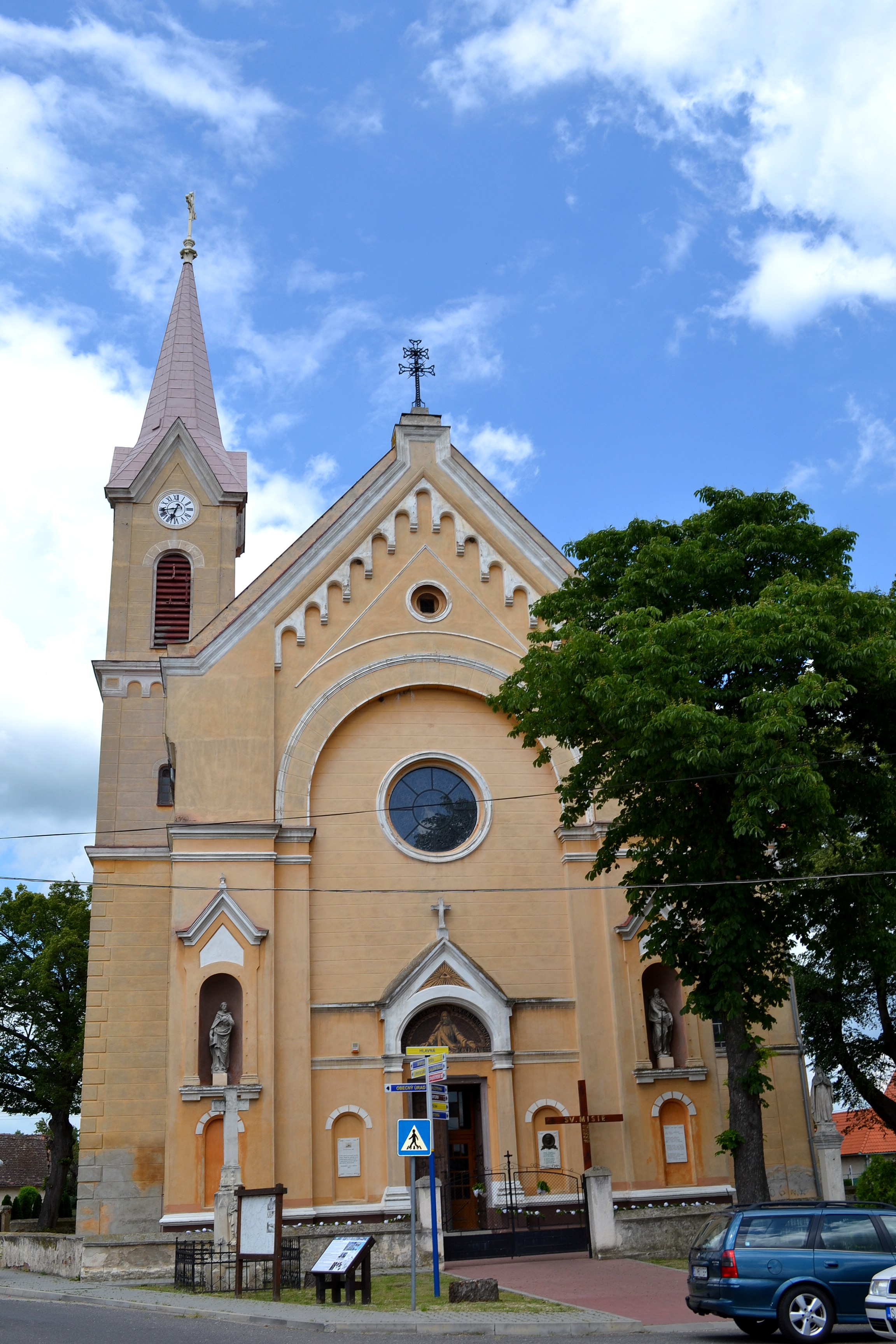 Vysoká pri Morave (okr. Malacky), Kostol svätého Ondreja; celkový pohľad z juhu